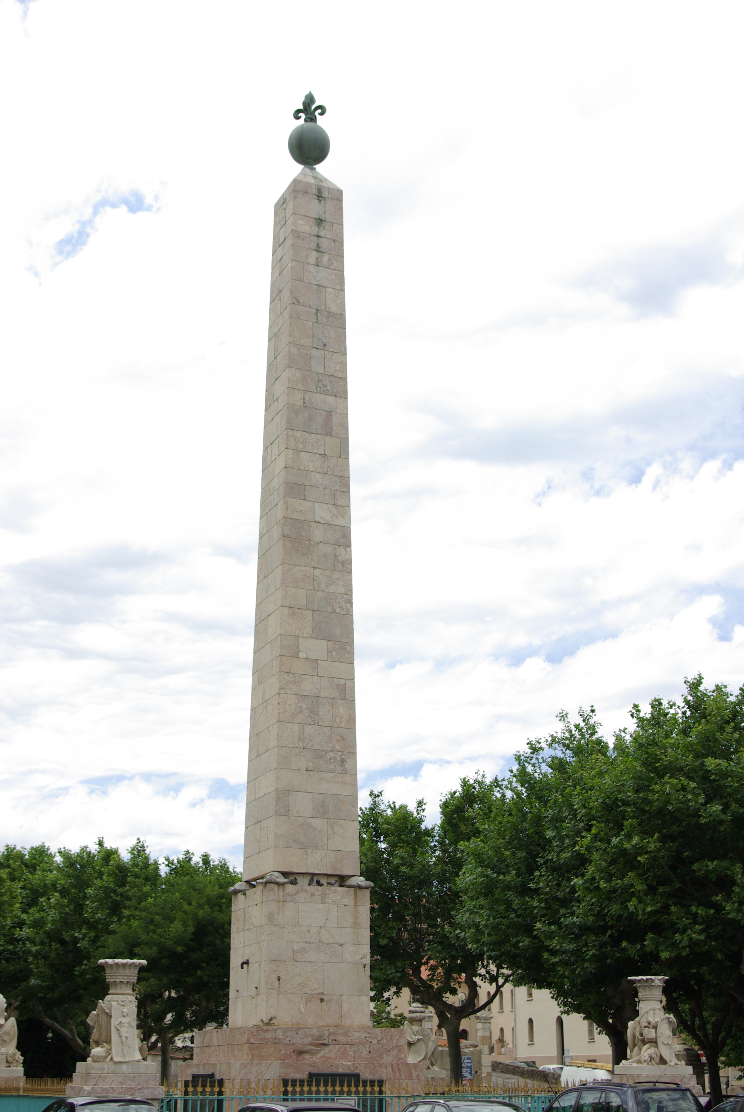 Obelisk of Port-VendresObélisque de Port-Vendres